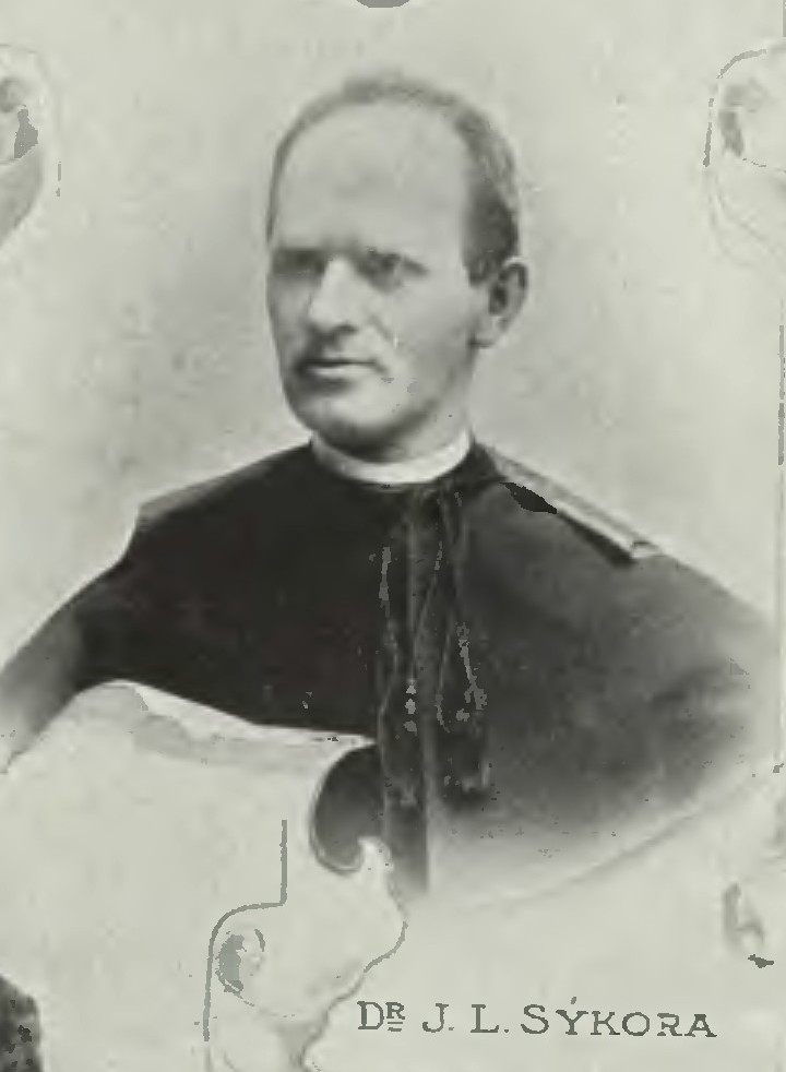 Portrét – Jan Ladislav Sýkora (1852-1928), Český římskokatolický teolog.